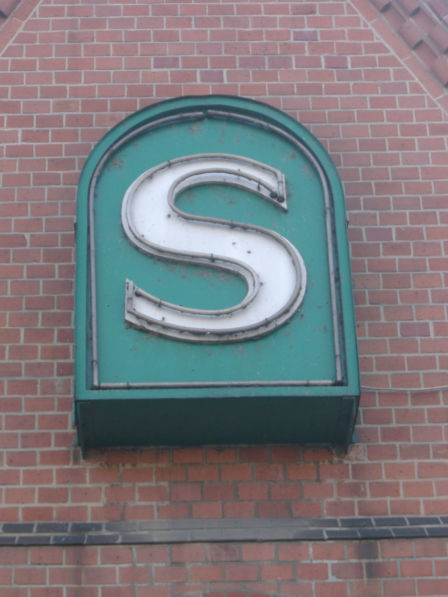 S-Bahn sign in Berlin, Berlin-Schöneweide, Berlin-Niederschöneweide